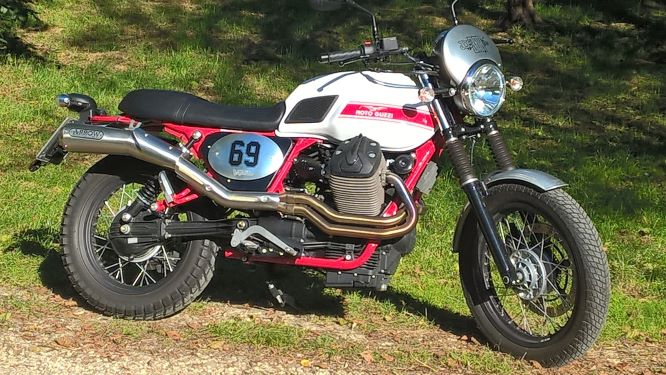 Motorrad Moto Guzzi